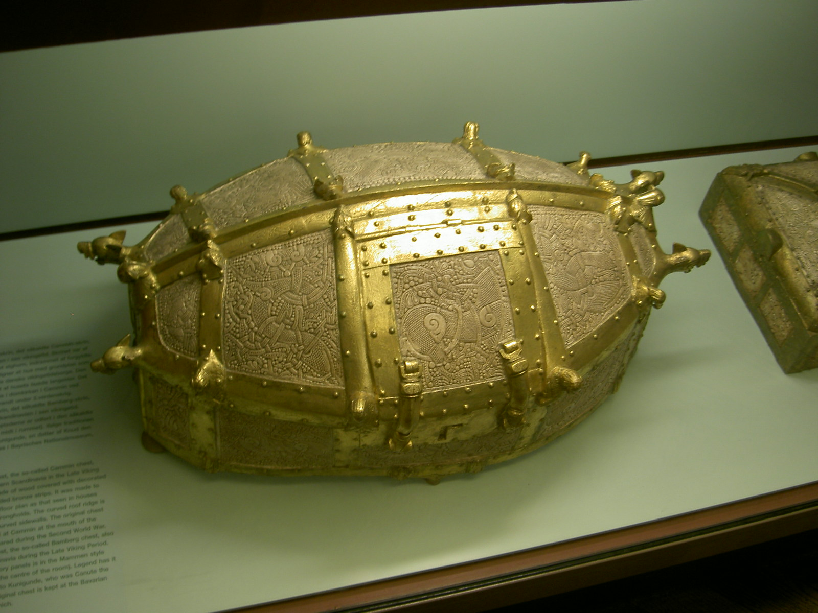 Kopenhagen, National Museum